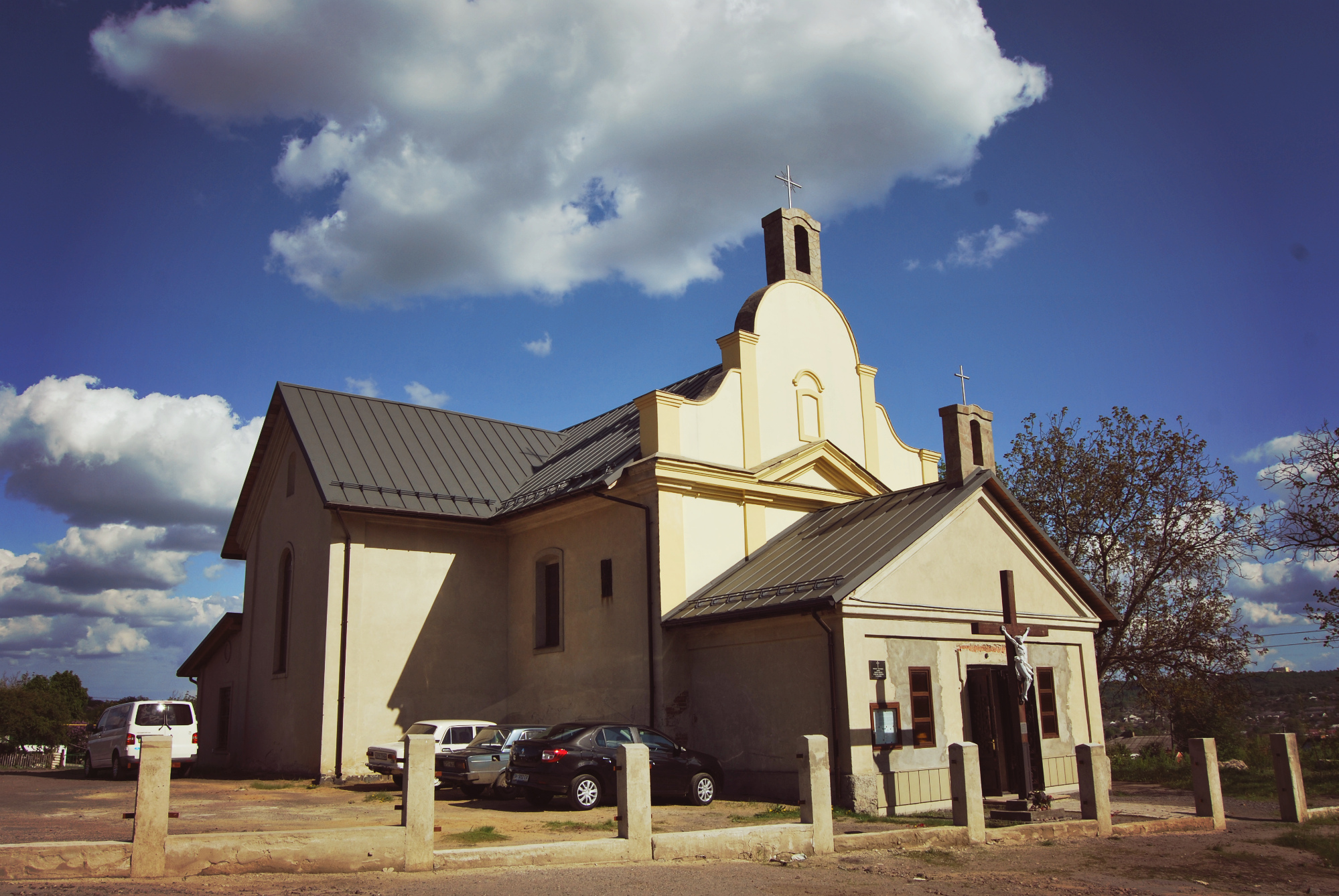 Костьол св. Станіслава, Балта, вул. Уварова, 2